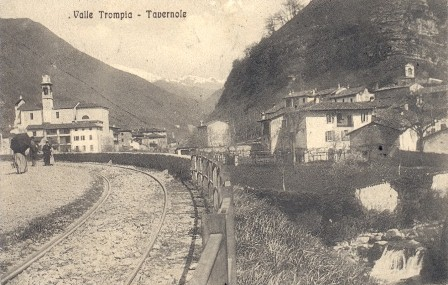 Tavernole con binario tranviario